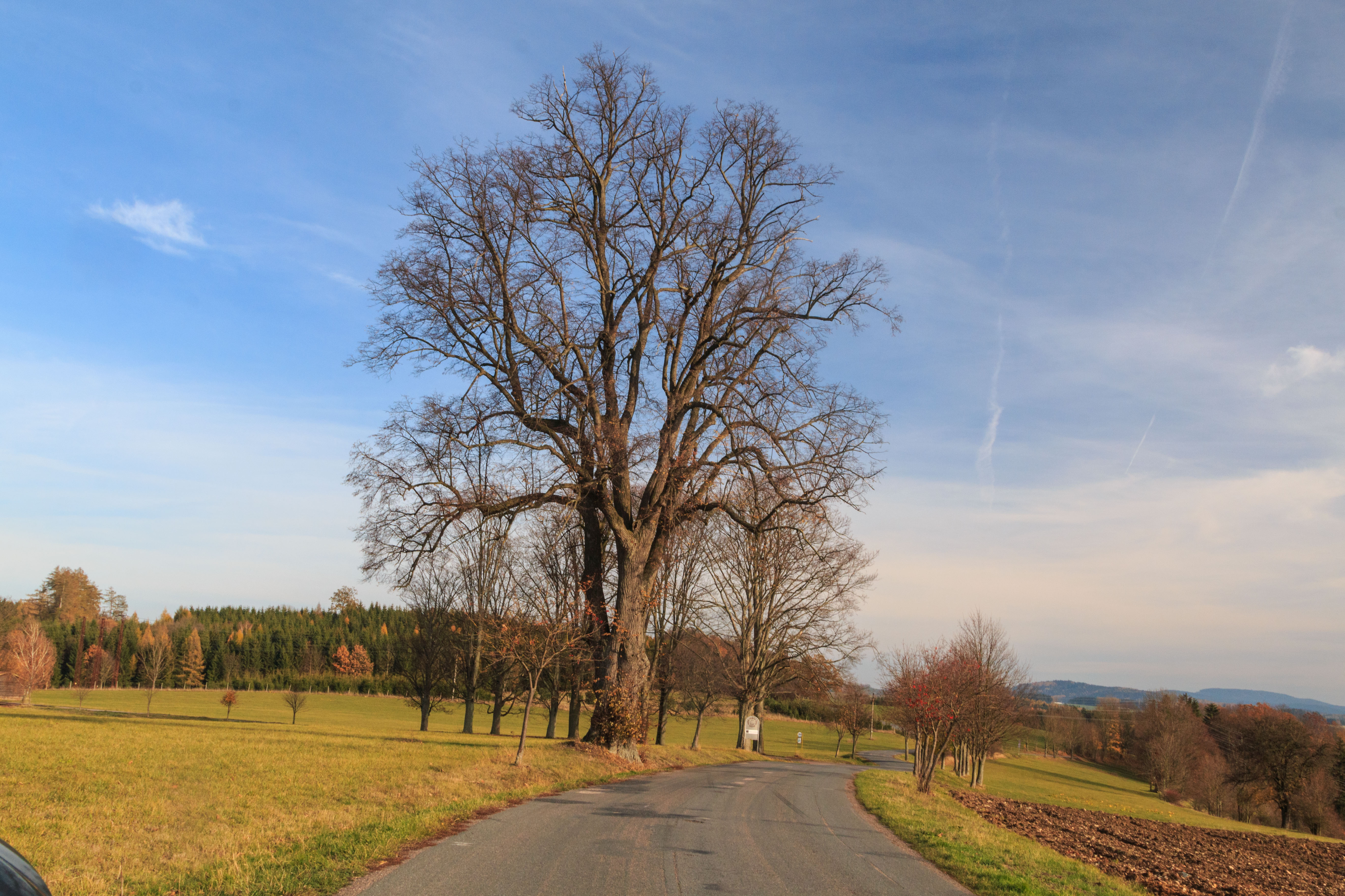 Památná lípa u Žamberka